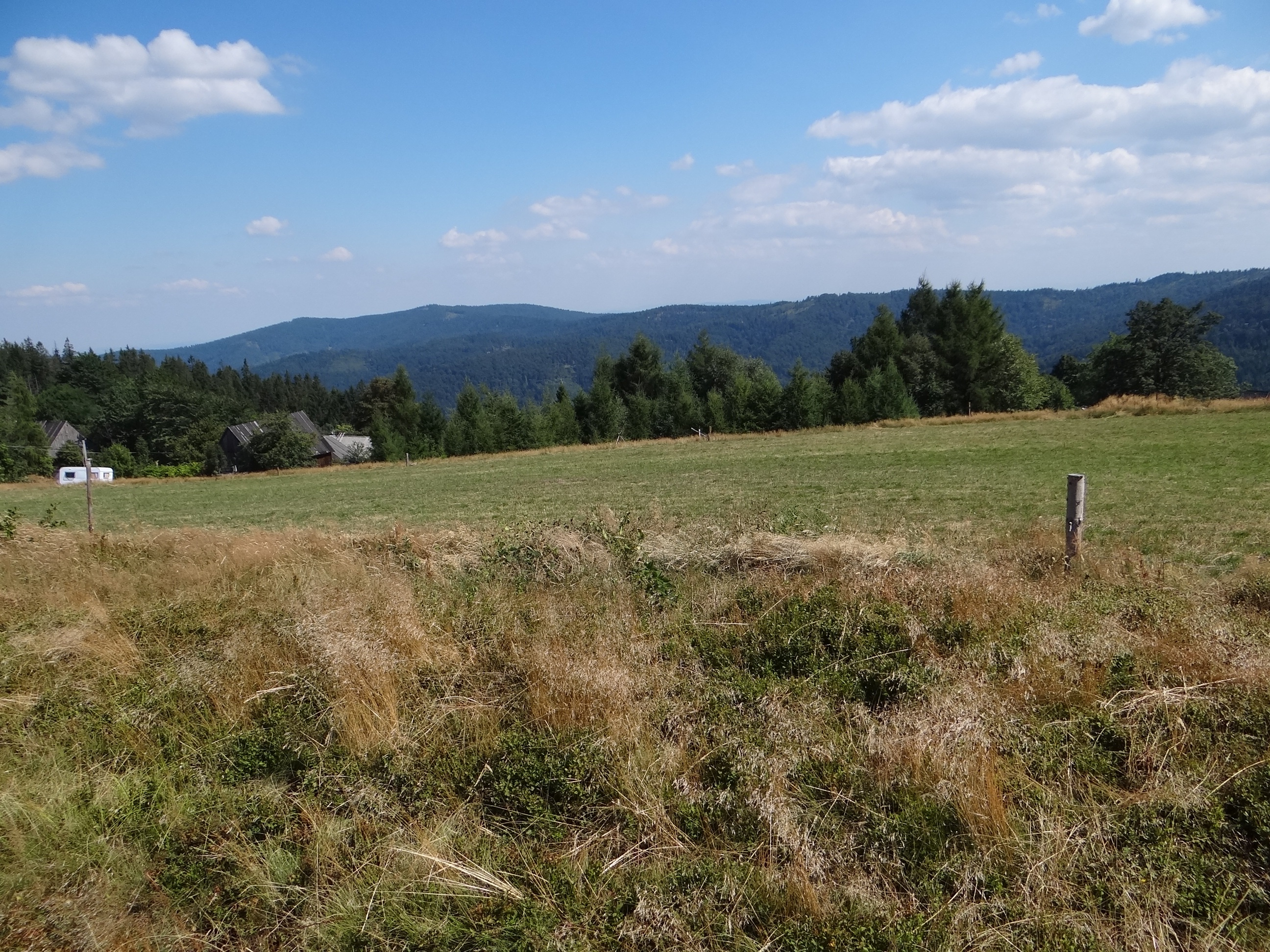 Potrójna, widok na wschód